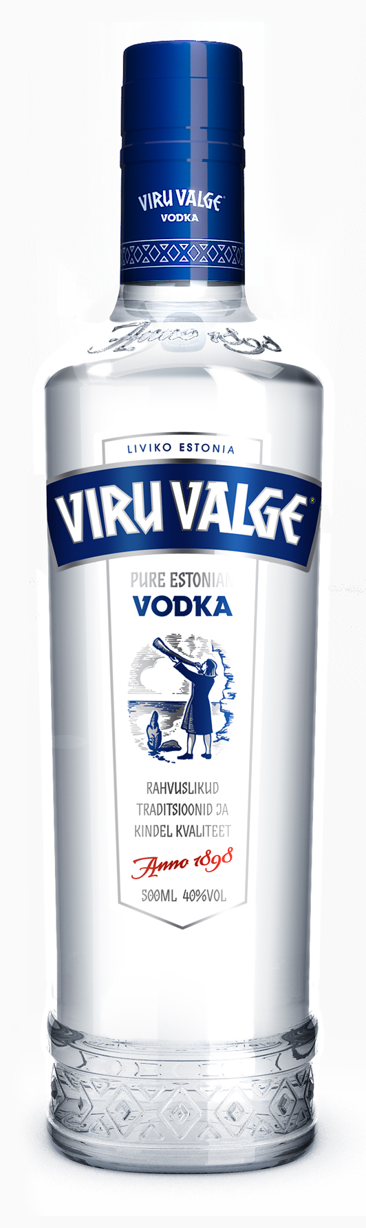 Viru Valge 500 ml.Tähelepanu! Tegemist on alkoholiga. Alkohol võib kahjustada teie tervist.